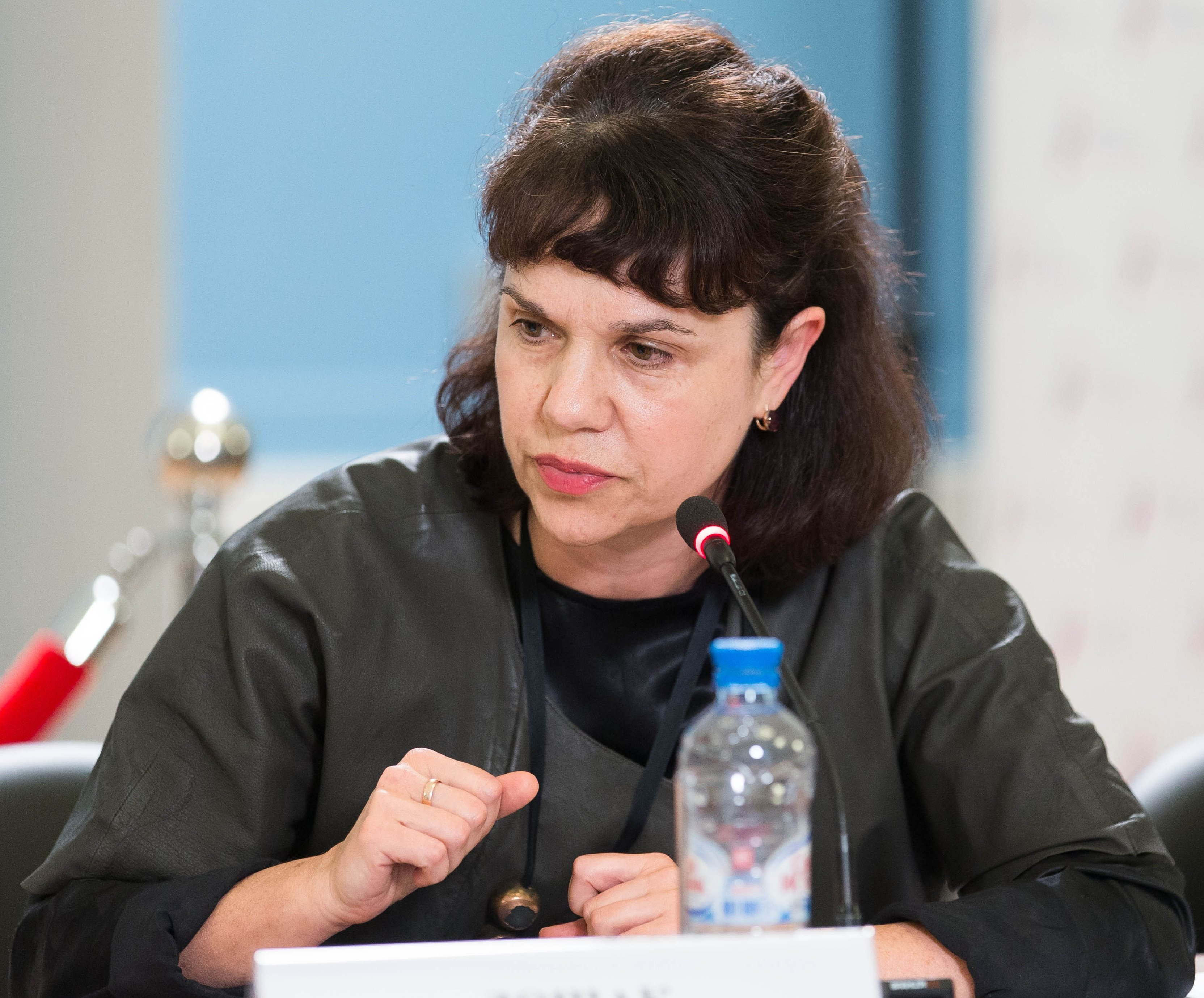 Марина Девовна Лошак (род.1955) — российский искусствовед